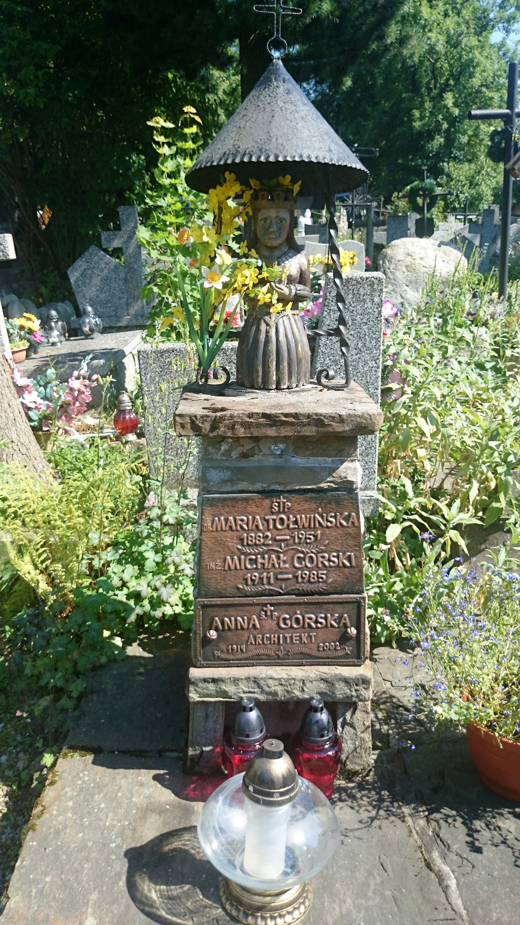 New Cemetery in Zakopane